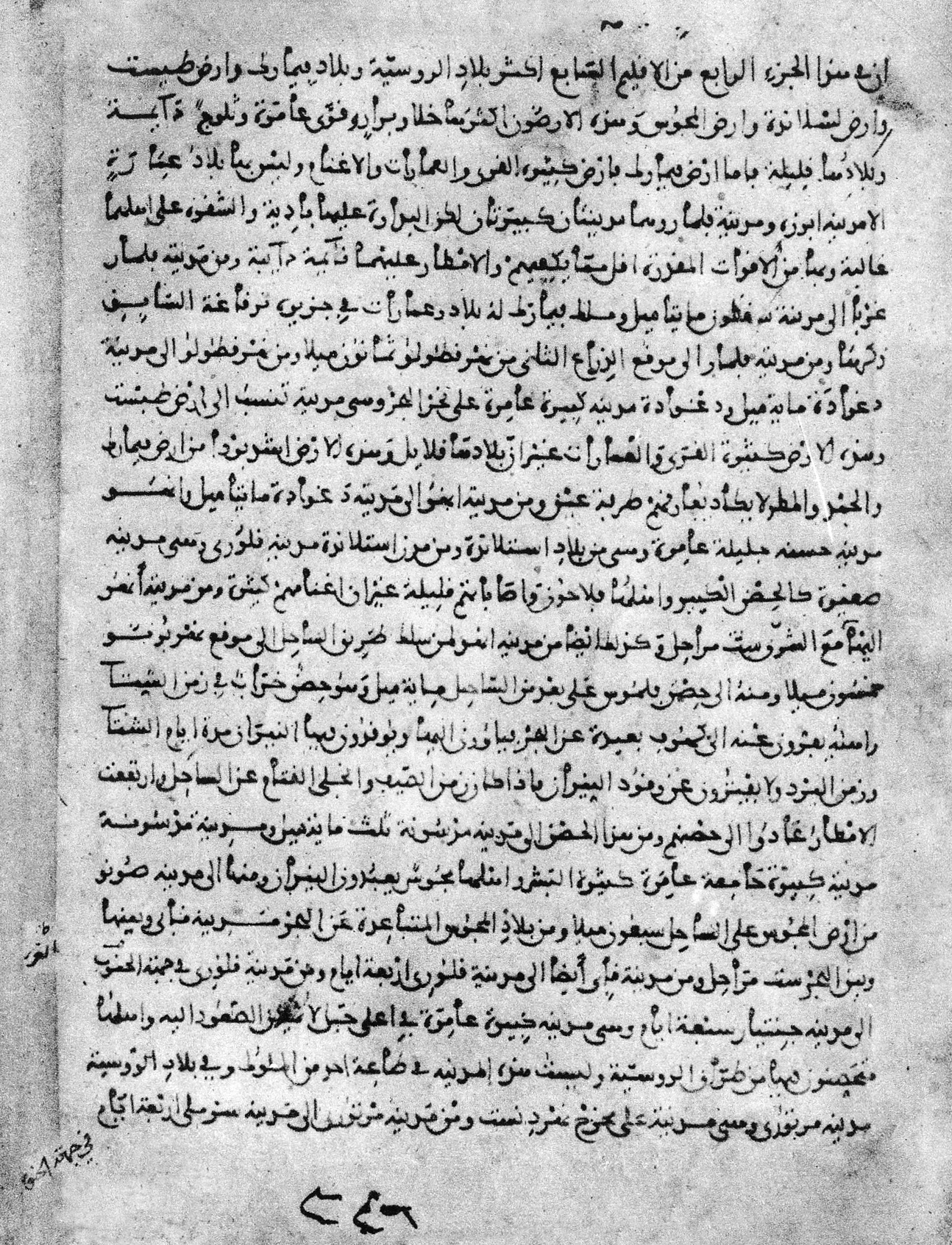 Al-Idrisi describing Finland